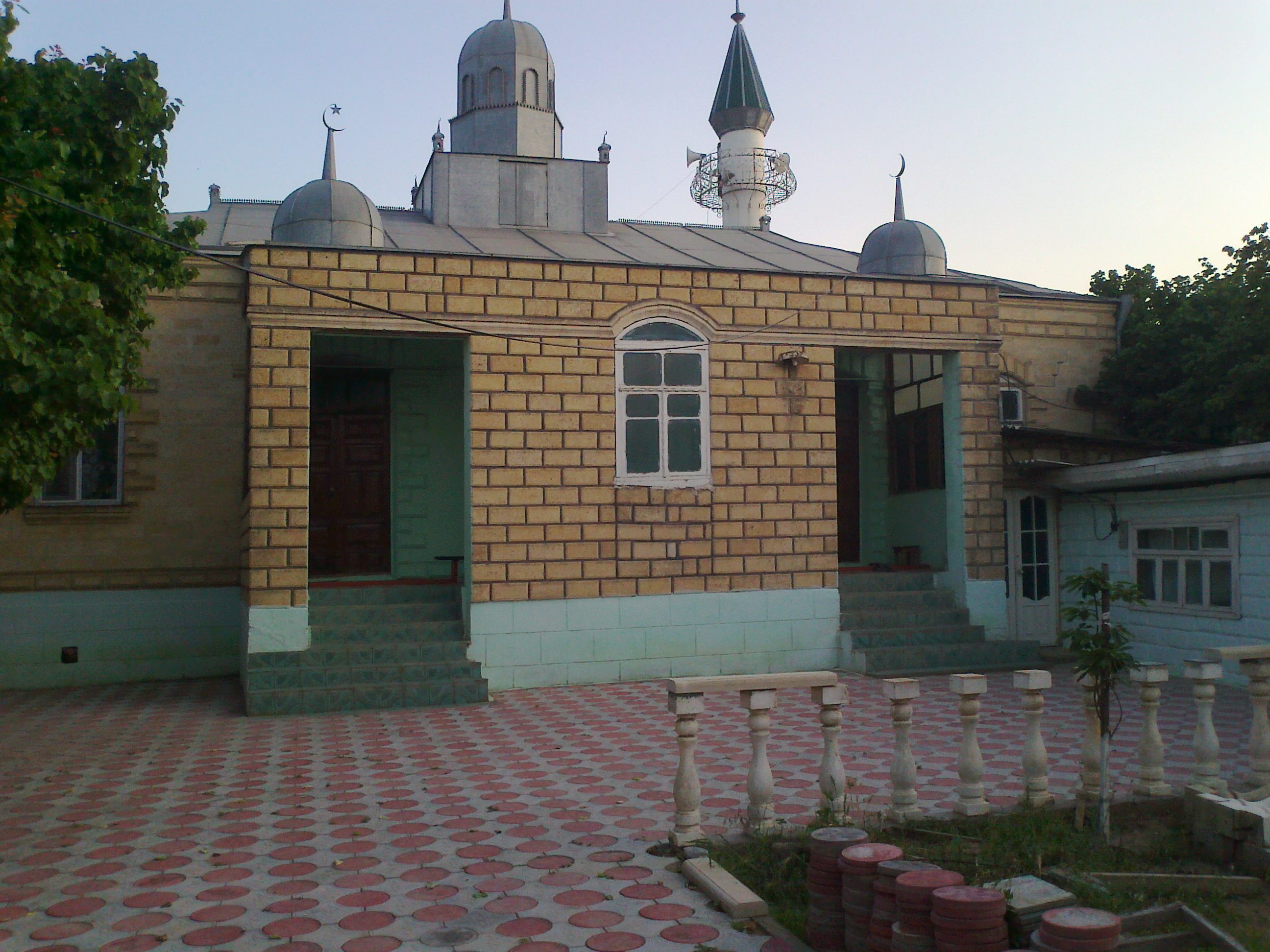 Мечеть построена в 1991 году и находится в центре села.